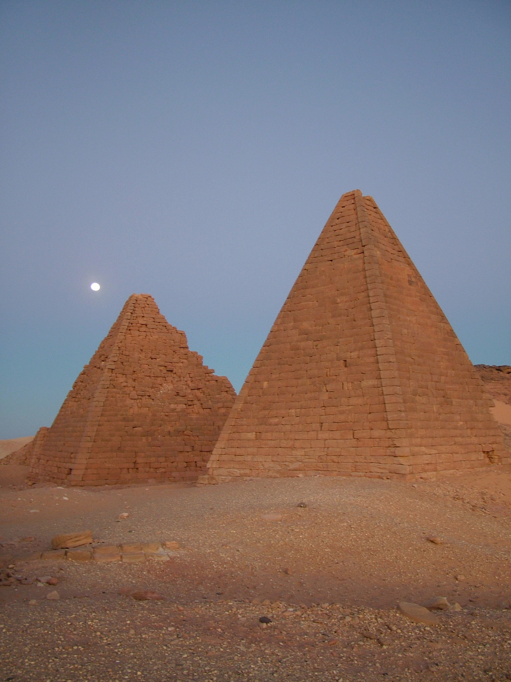 Meroitic pyramids in Gebel Barkal, Nubia, Sudan